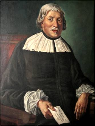 Portret hrabiego Melchiora Ferdynanda de Gaschina.